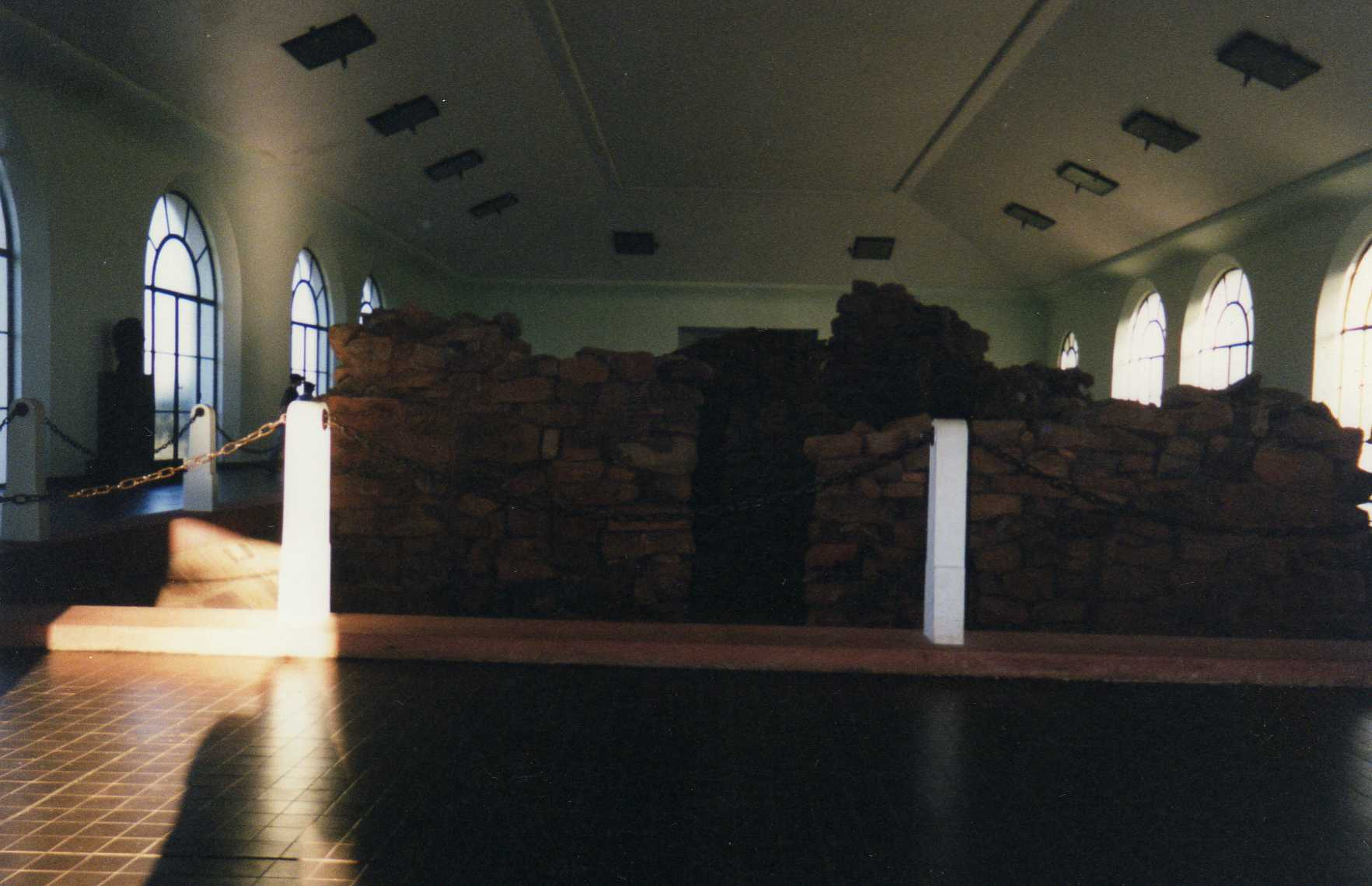 Casa natal del General Don José de San Martín, en la localidad argentina de Yapeyú, en Corrientes.